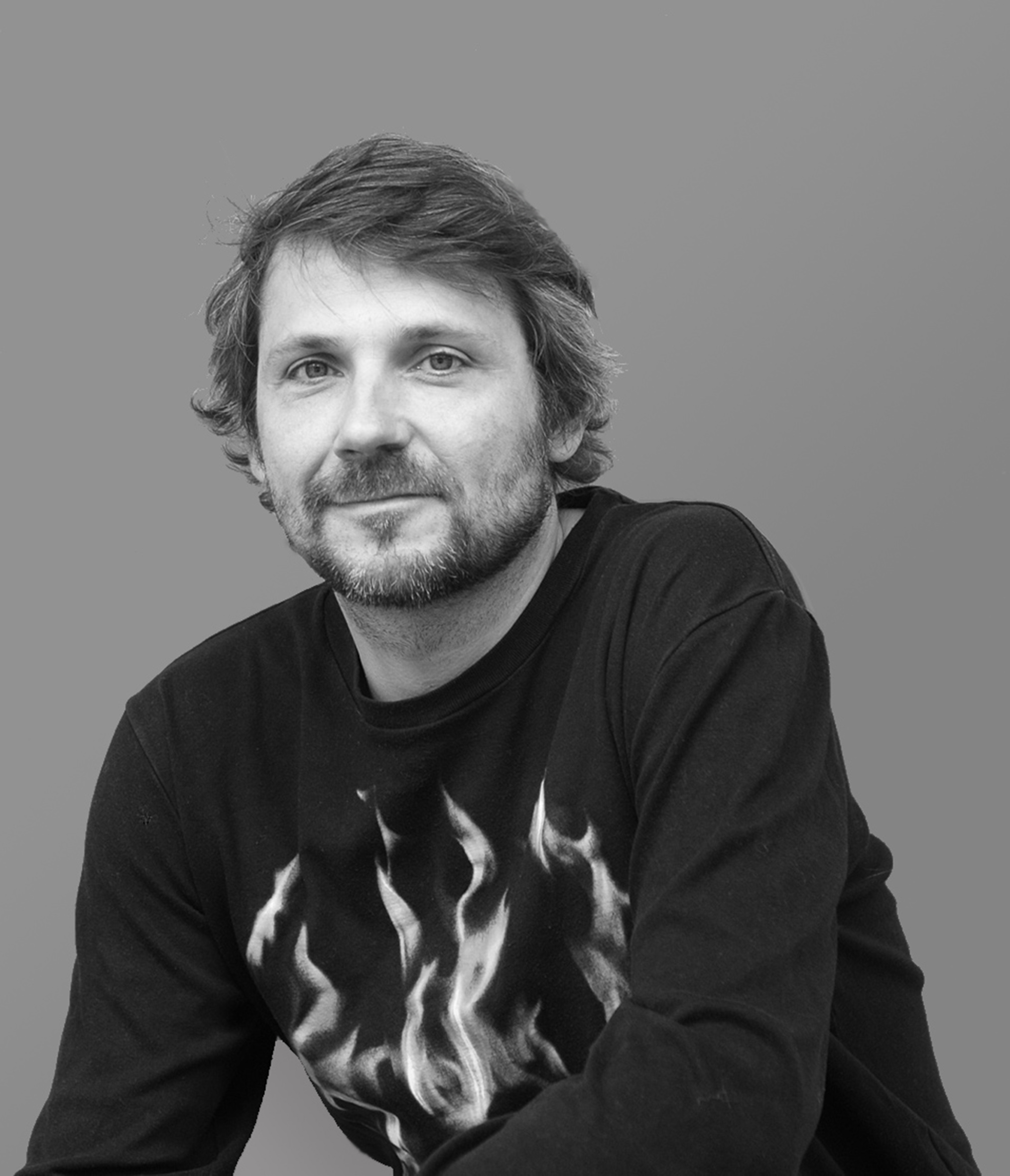 Portrait XNT atelier Bruxelles 2012